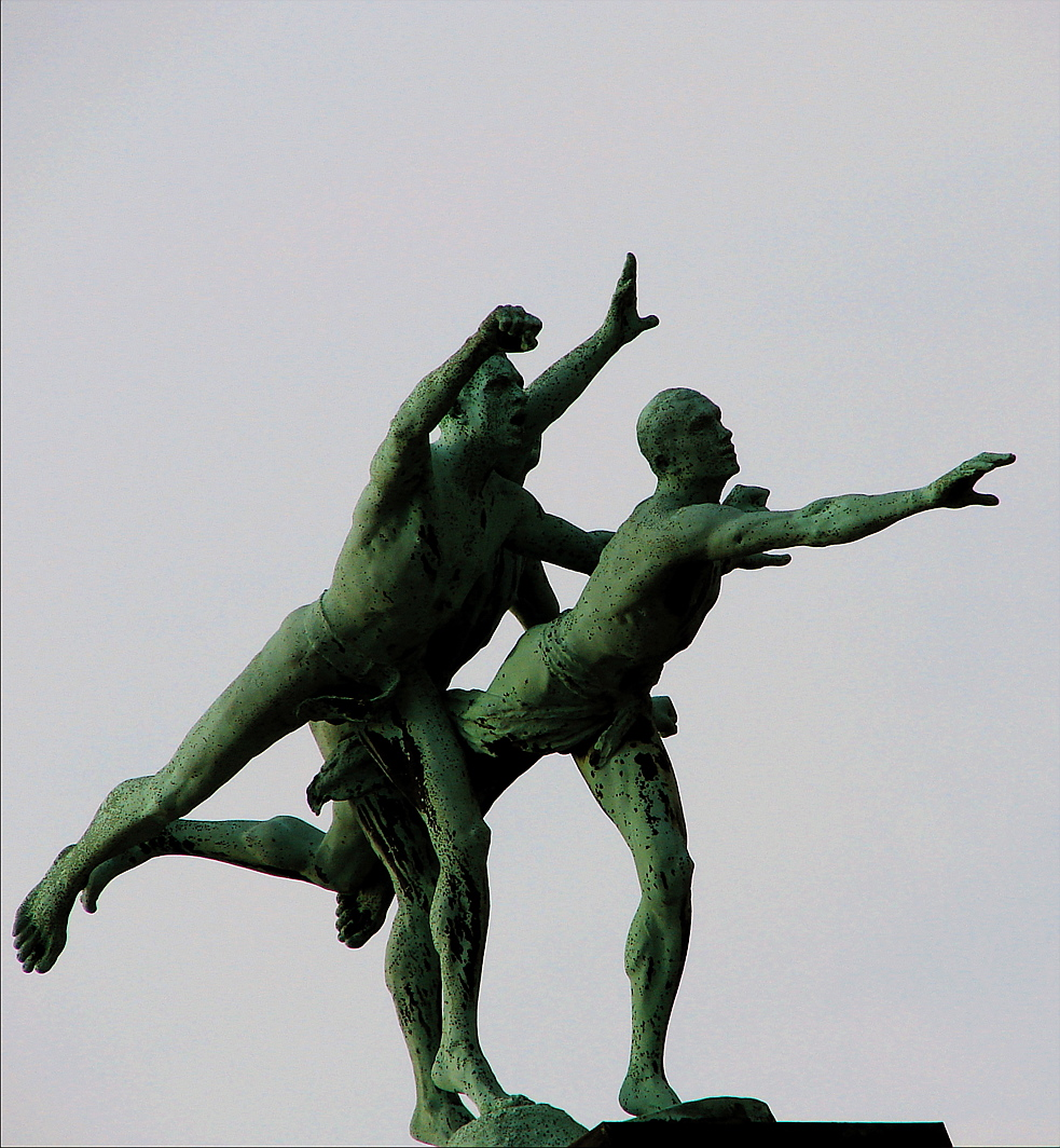 Alfred Boucher (1850 – 1934), Ved målet, over Idrætsparkens portal, København